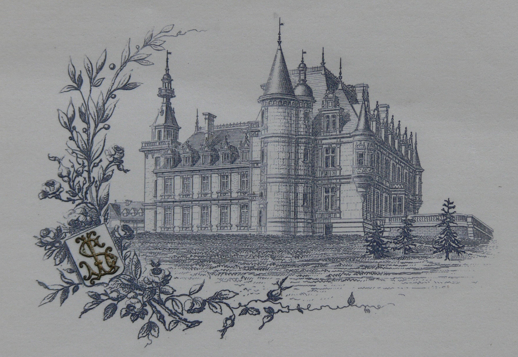 Château de Brochon (Côte d'Or, France) : en-tête d'une lettre de S. Liégeard